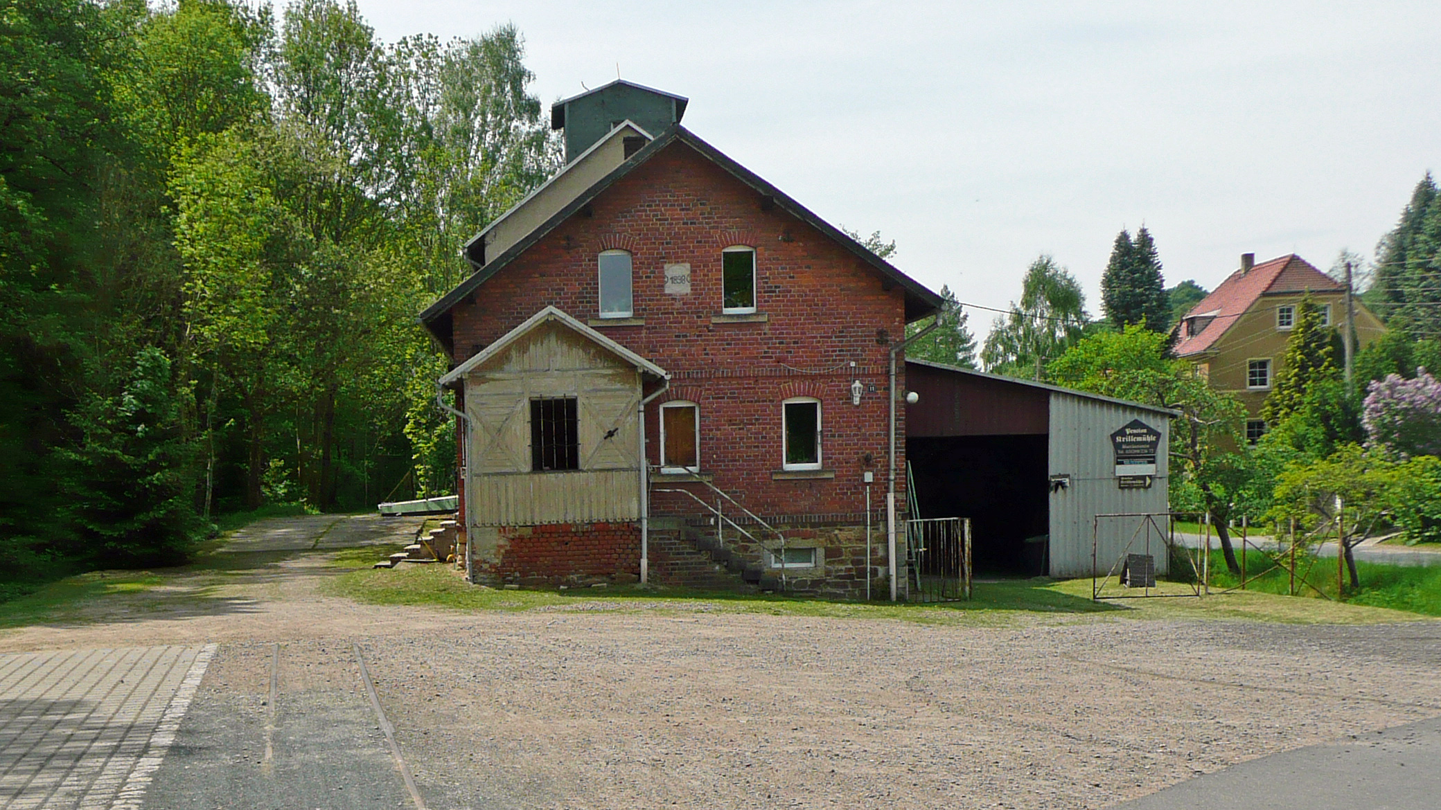 Ehemaliges Bahnhofsareal mit Bahnwärterhaus und Gleisreststück in Helbigsdorf